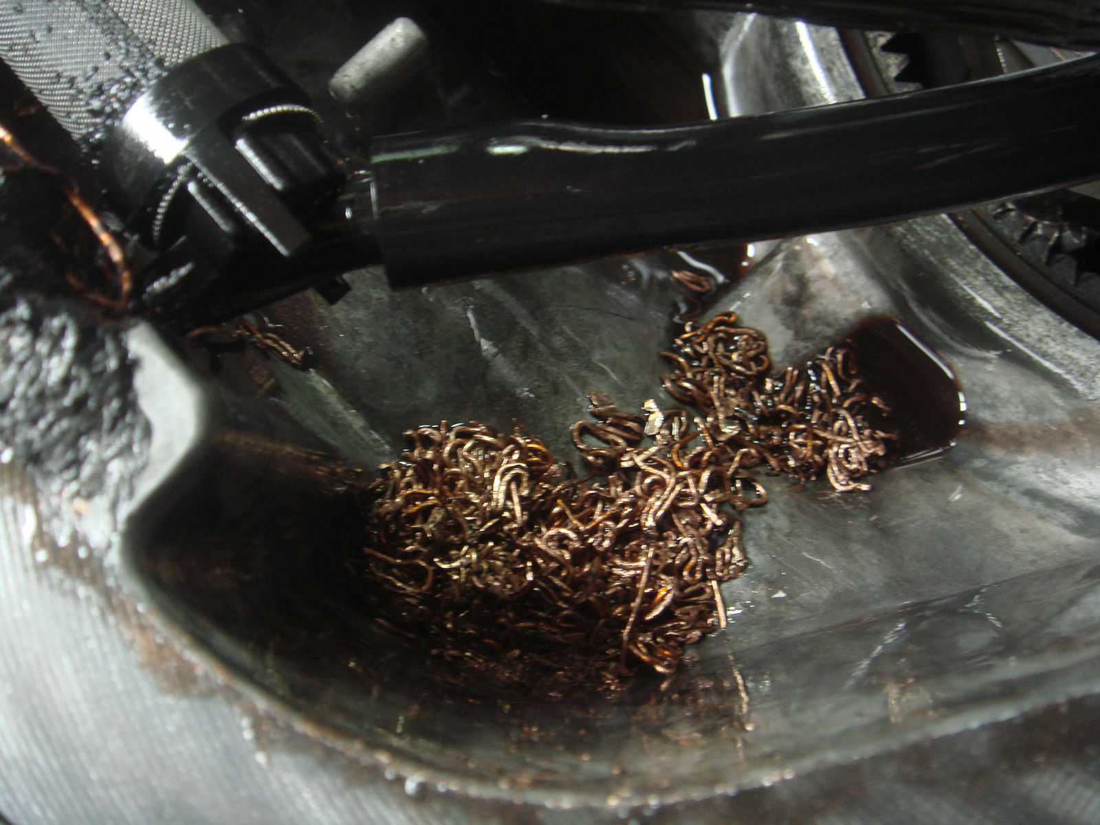 Остатки медной оплётки электромагнитной муфты включения полного привода в раздаточной коробке автомобиля Ford Explorer.